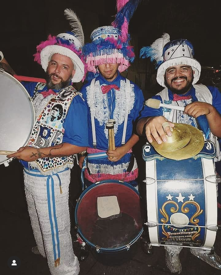 Percusión de centro murga Los Amos de Devoto, en los extremos los dos directores de la percusión y en el medio el zurdista